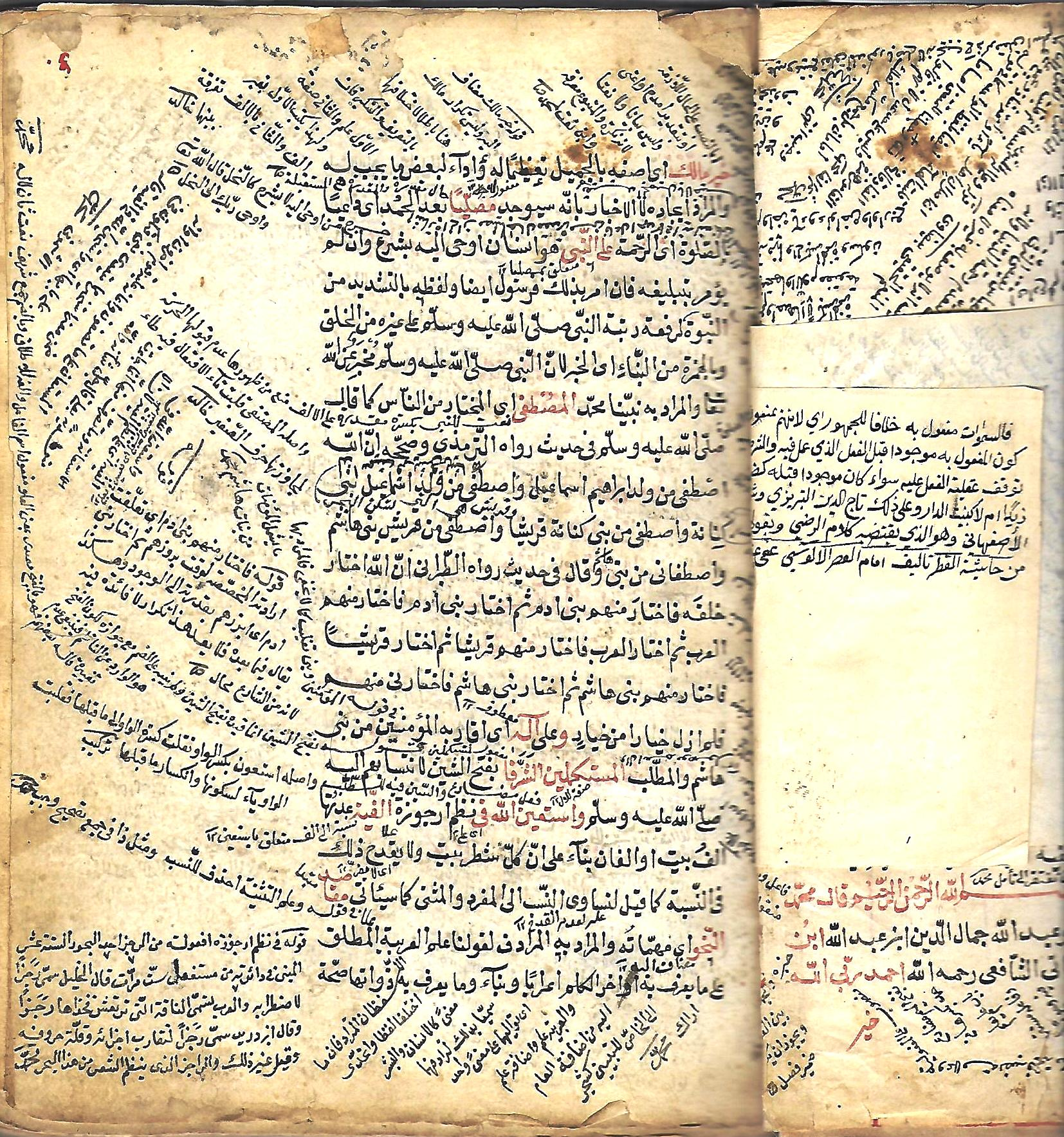 الصفحة الثانية من كتاب مخطوط في شرح ألفية ابن مالك في النحو، وهي من تأليف الشيخ محمد بن عبد الله بن مالك الطائي الجياني المعروف بـابن مالك، والمخطوط هو من كتابة أحمد الجريسي المعروف بالصغير ولقد نسخه بيدهِ في 27 من شهر ذي القعدة عام 1175 هـ/1762م، ثم اشتراه الشيخ قاسم أفندي المفتي من سوق بغداد كما أشار بذلك على غلاف المخطوط